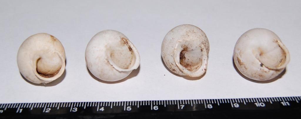 Marmorana sicana Fèrussac, 1822 Monte Pellegrino, Palermo